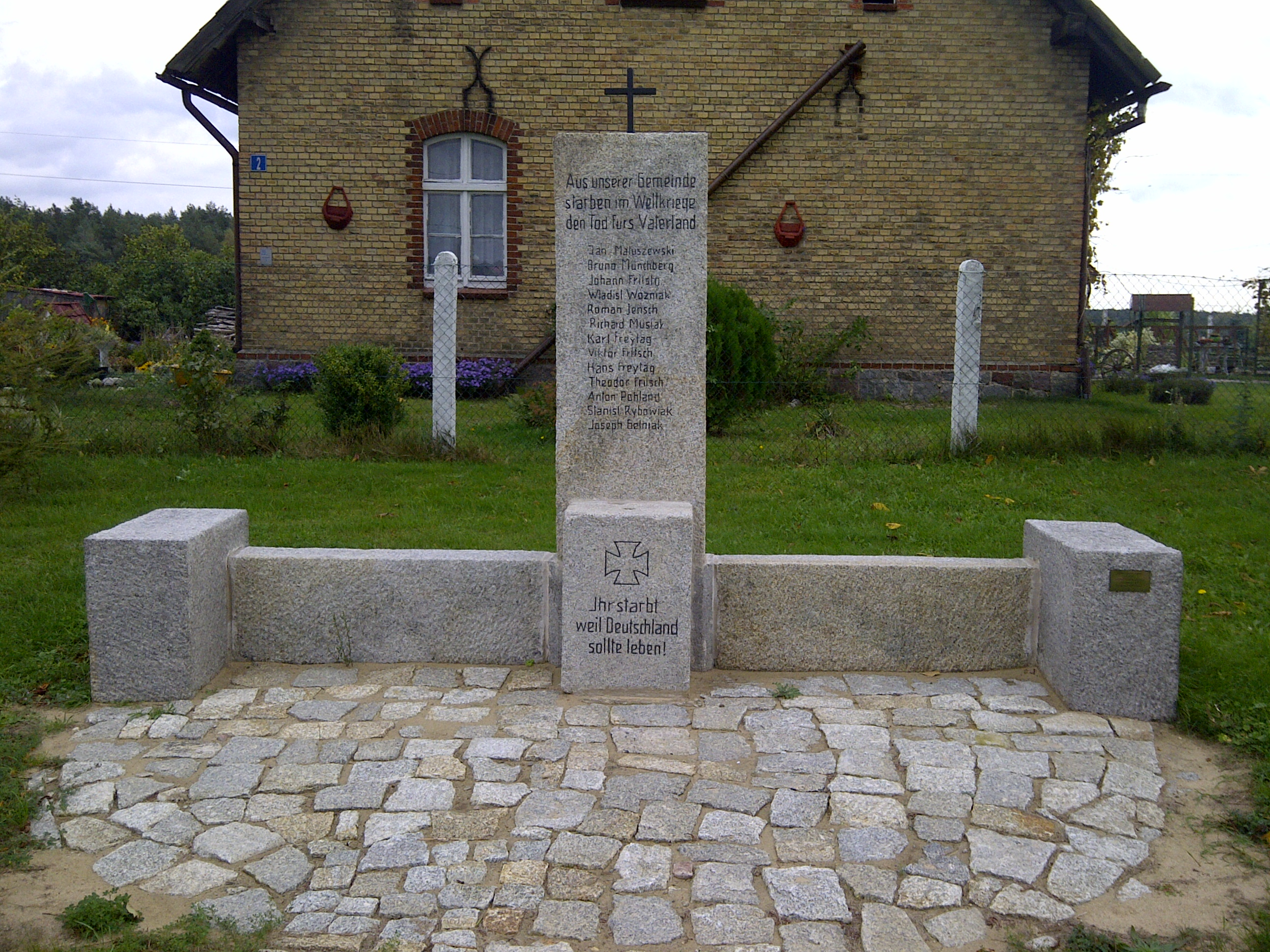 Kriegerdenkmal. Gedenktafel Gefallene 1914-1918 in Kuligowo (Kulkau), Woiwodschaft Lebus, Polen.